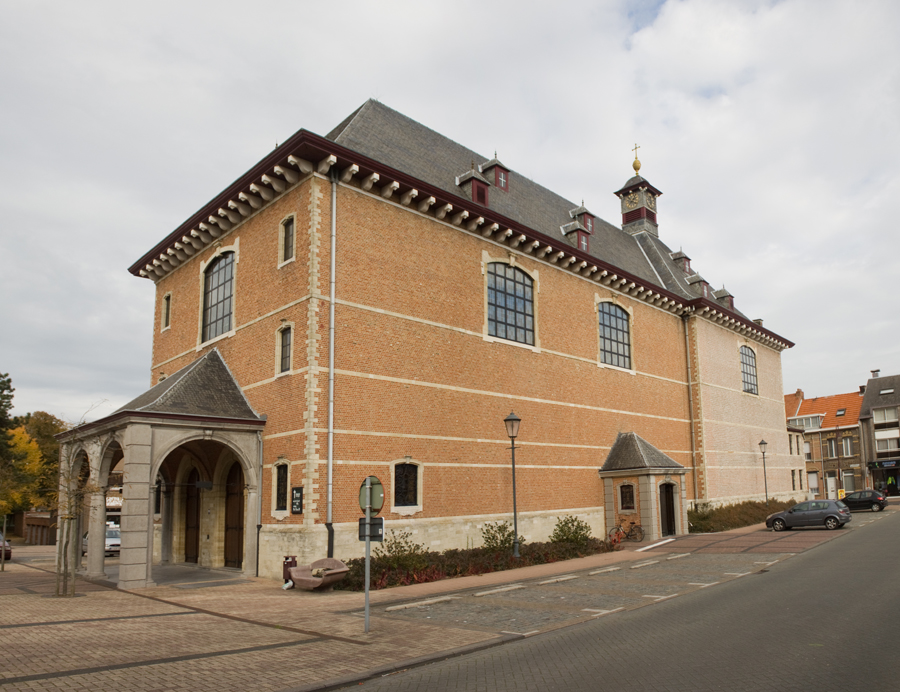 Parochiekerk Onze-Lieve-Vrouw van de Goede Wil te Duffel